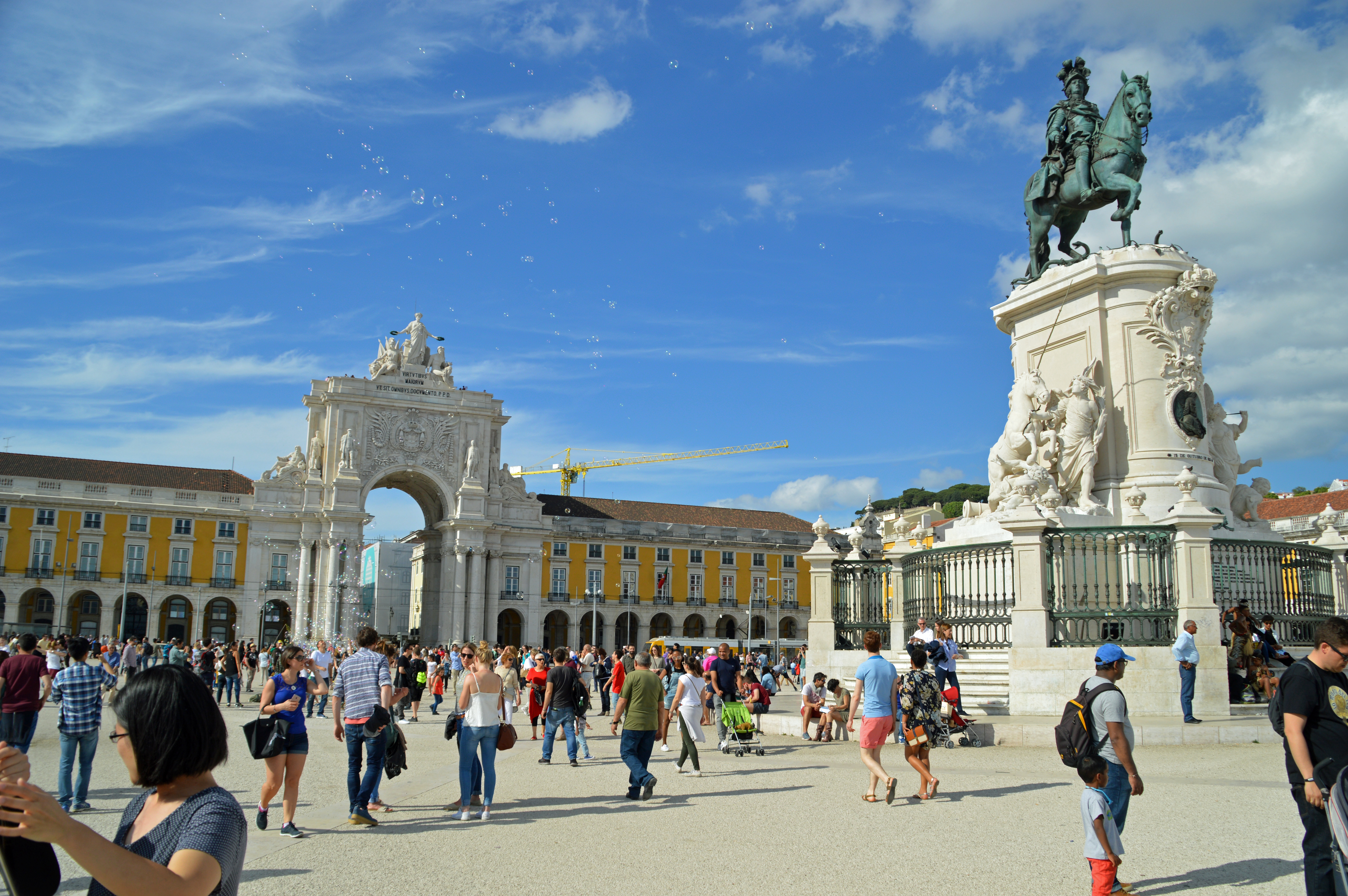 Selling Bubbles